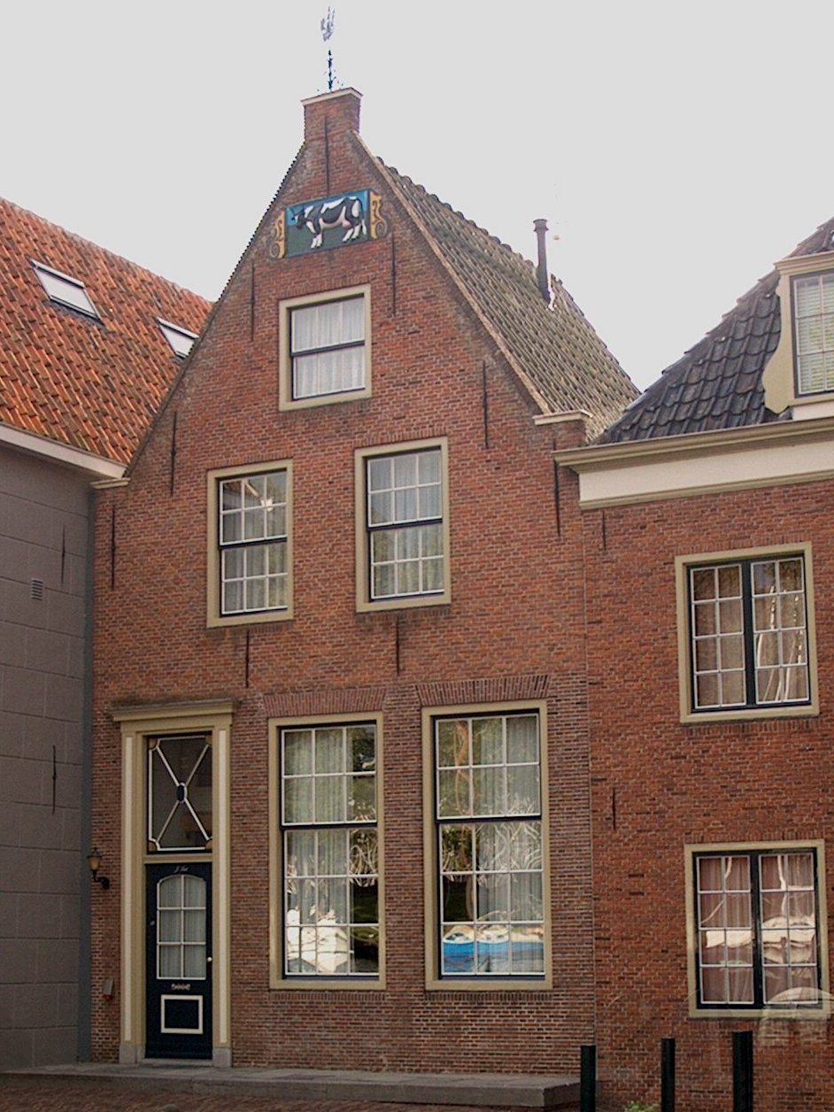 Het huis waar W.IJ.Bontekoe geboren is - Veermanskade 15, Hoorn